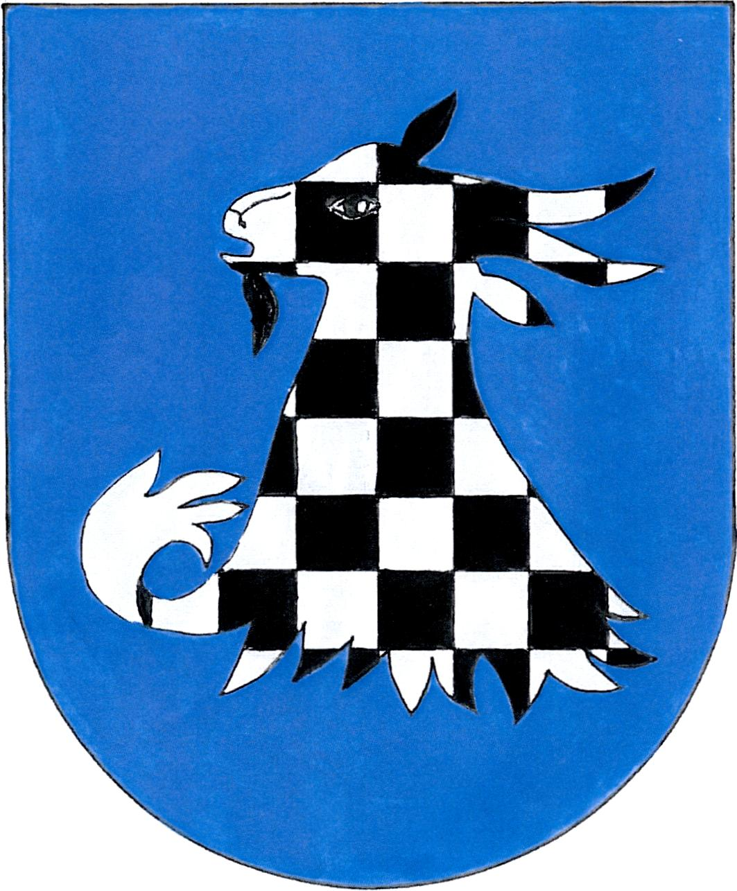 Znak obce Choteč (okres Jičín)